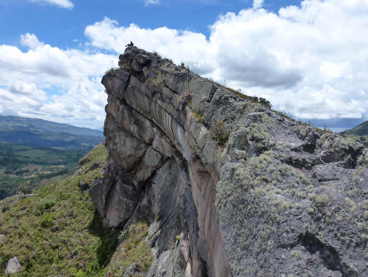 Una cadena montañosa de varios kilómetros de largo. Su punto máximo tiene 3.180 metros sobre el nivel de mar.